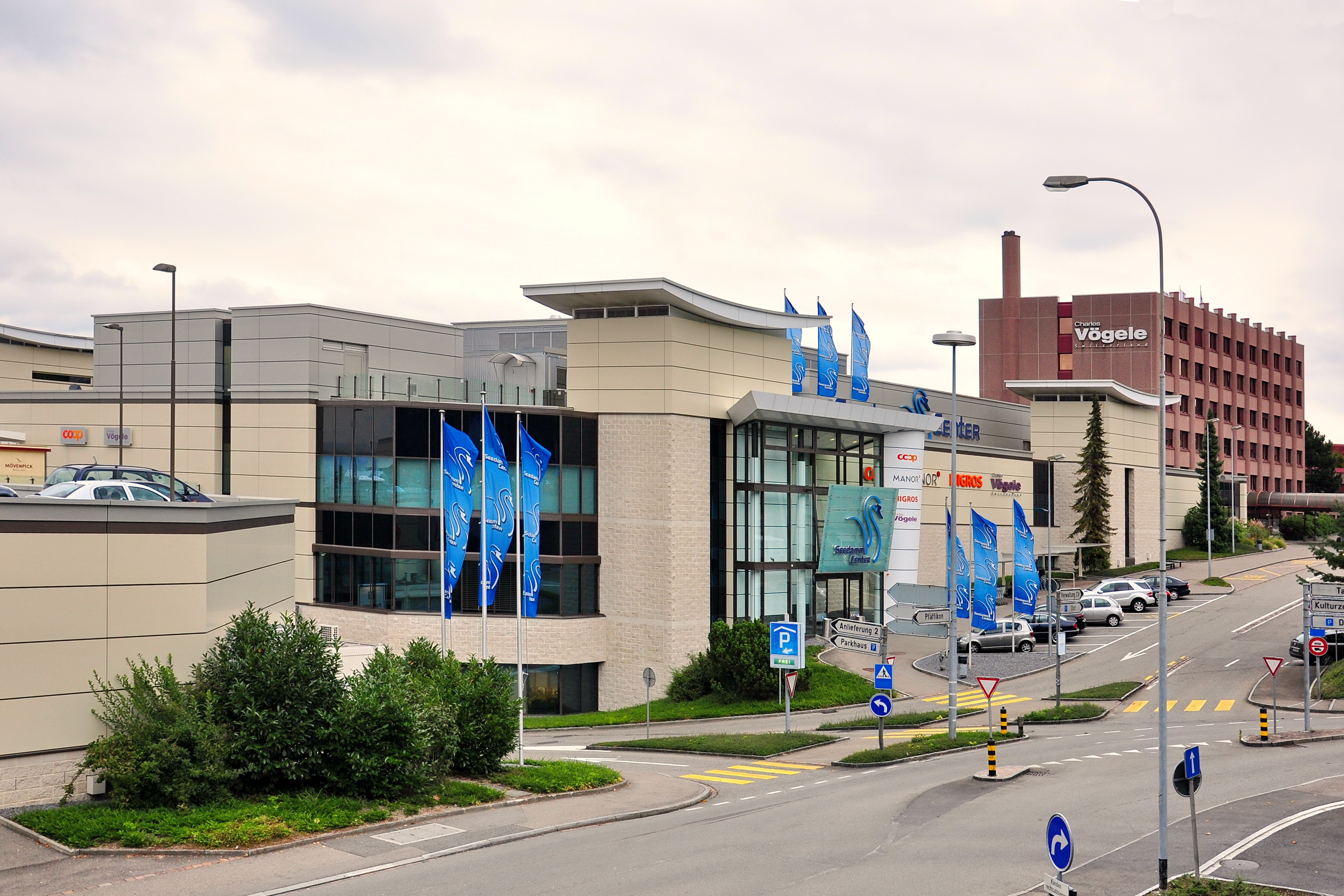 Seedamm-Center in Pfäffikon SZ (Switzerland)